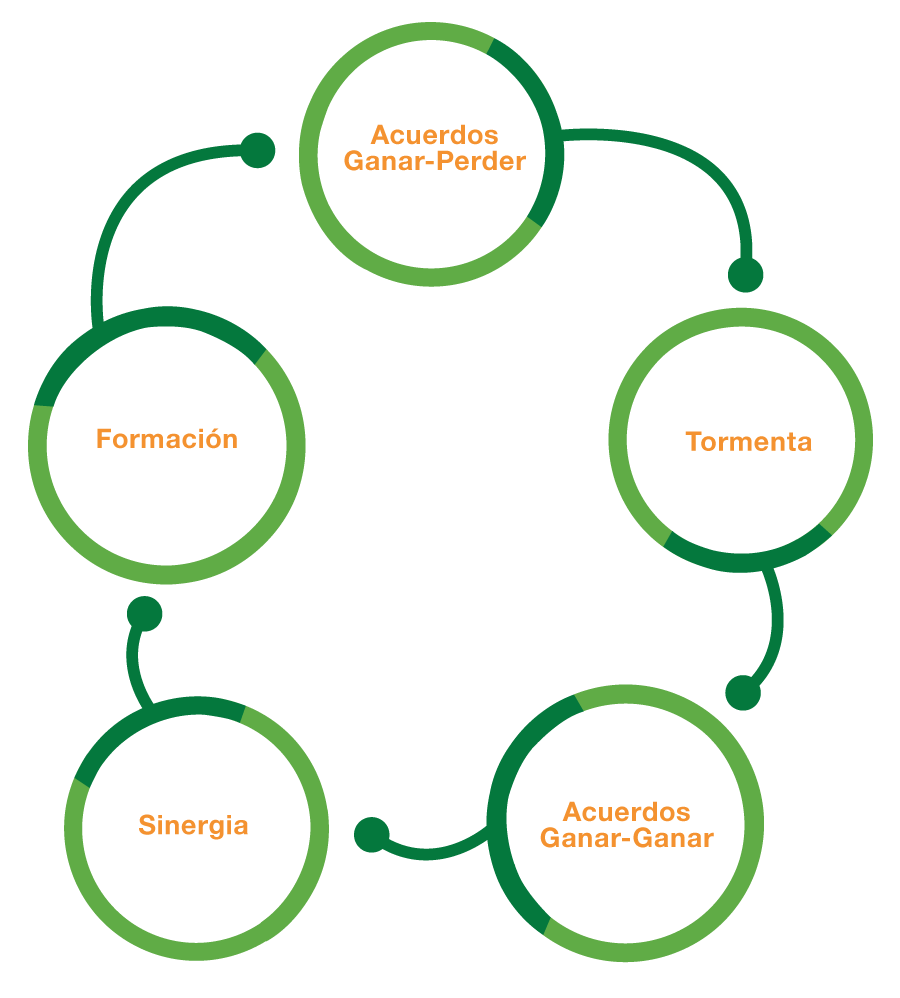 Módelo clásico de la construcción de equipos